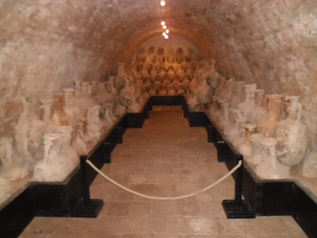 grad Vis